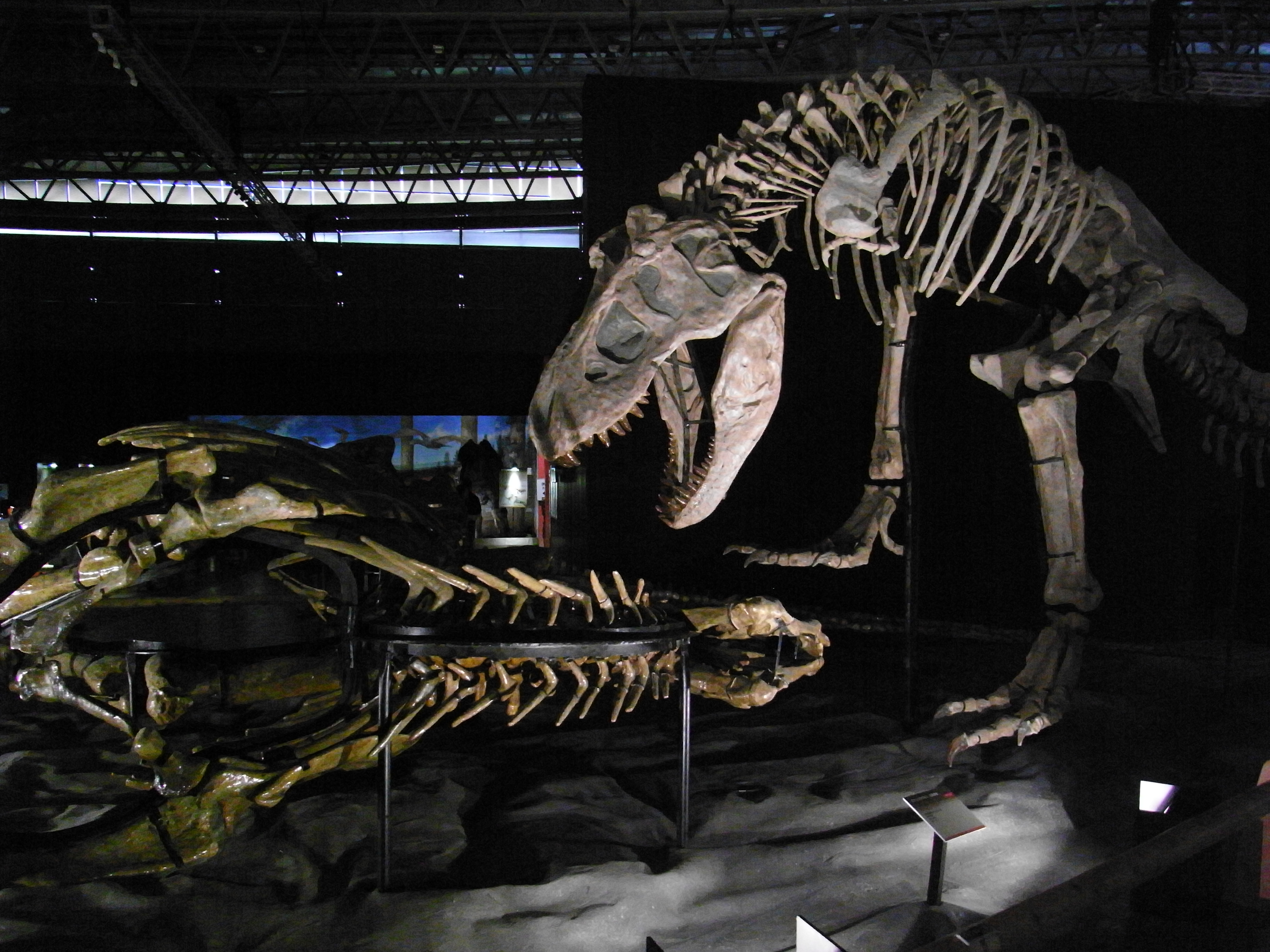 右足は最後の一撃か。